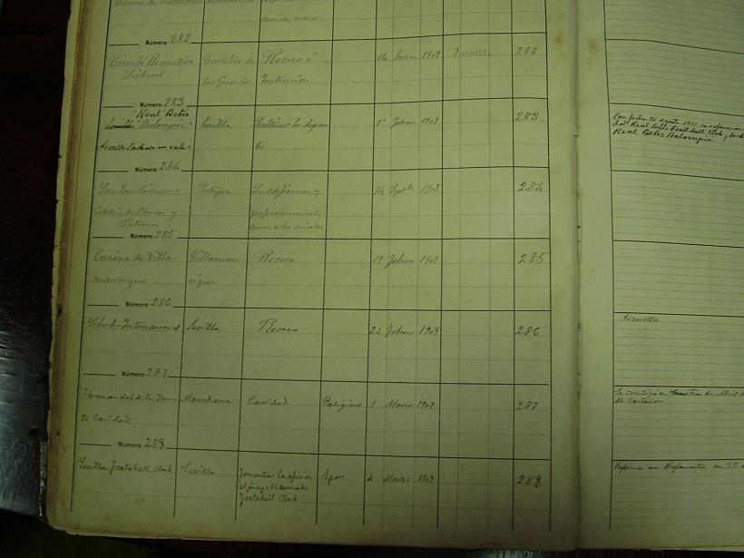 Página 36 del Libro de Registro del Gobierno Civil de Sevilla, en la que figura inscrito el Real Betis Balompié (modificación de denominación del Sevilla Balompié) con fecha 1 de febrero de 1909.